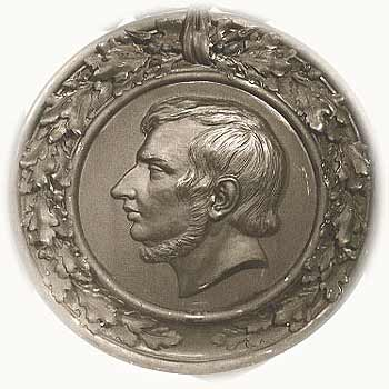 médaille ancienne représentant Max Schneckenburger Sculteur: Adolf Jahn